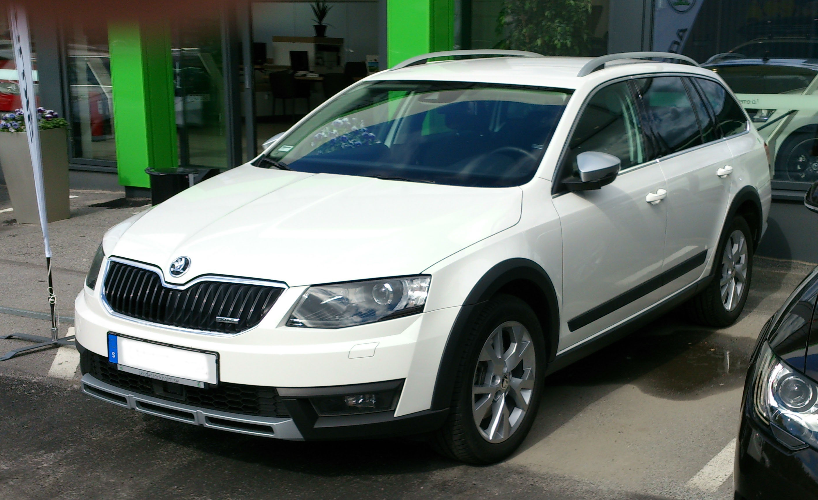 Škoda Octavia III Scout